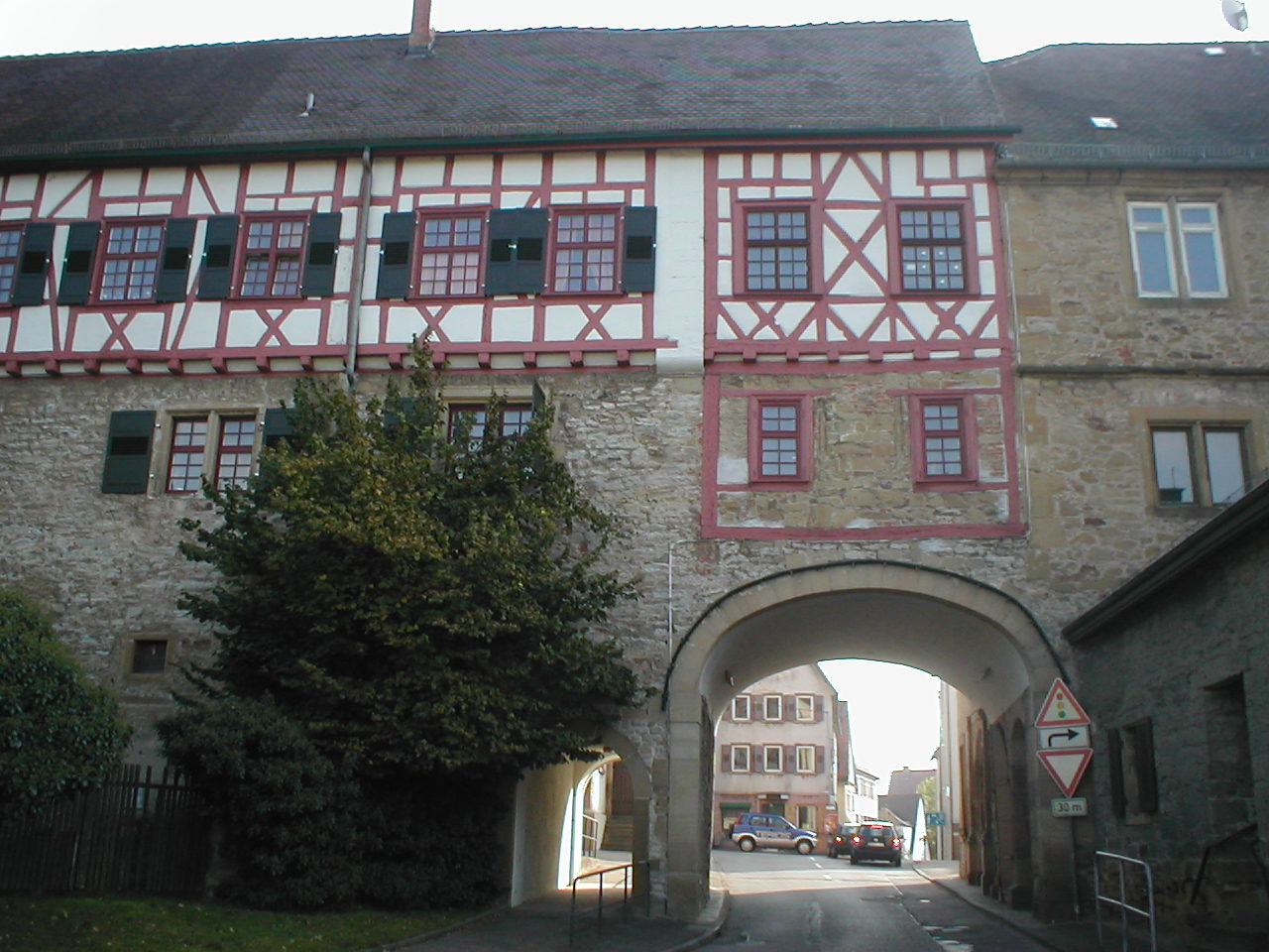 Torbau des Schlosses in Neuenstadt am Kocher. Durch das Tor führt die Landstraße nach Bürg.